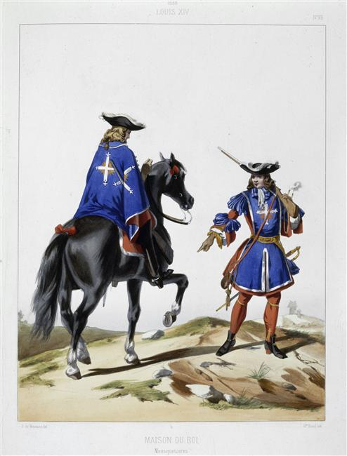 Mousquetaires de la Maison du Roi, 1688. Planche originale extraite de l'ouvrage Costumes militaires français depuis l’organisation des premières troupes régulières en 1439 jusqu’en 1789, par Alfred de Marbot et Joseph-Édouard Dunoyer de Noirmont, Paris, Clément, s.d. (1830-1860).